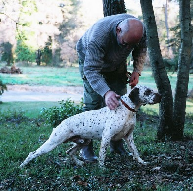 Michel Comte faisant couler son braque du Bourbonnais à l'arrêt